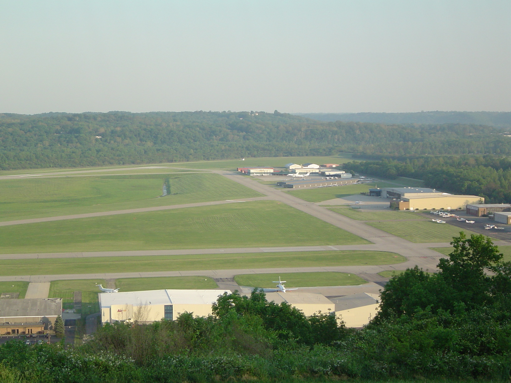 Lunken airport